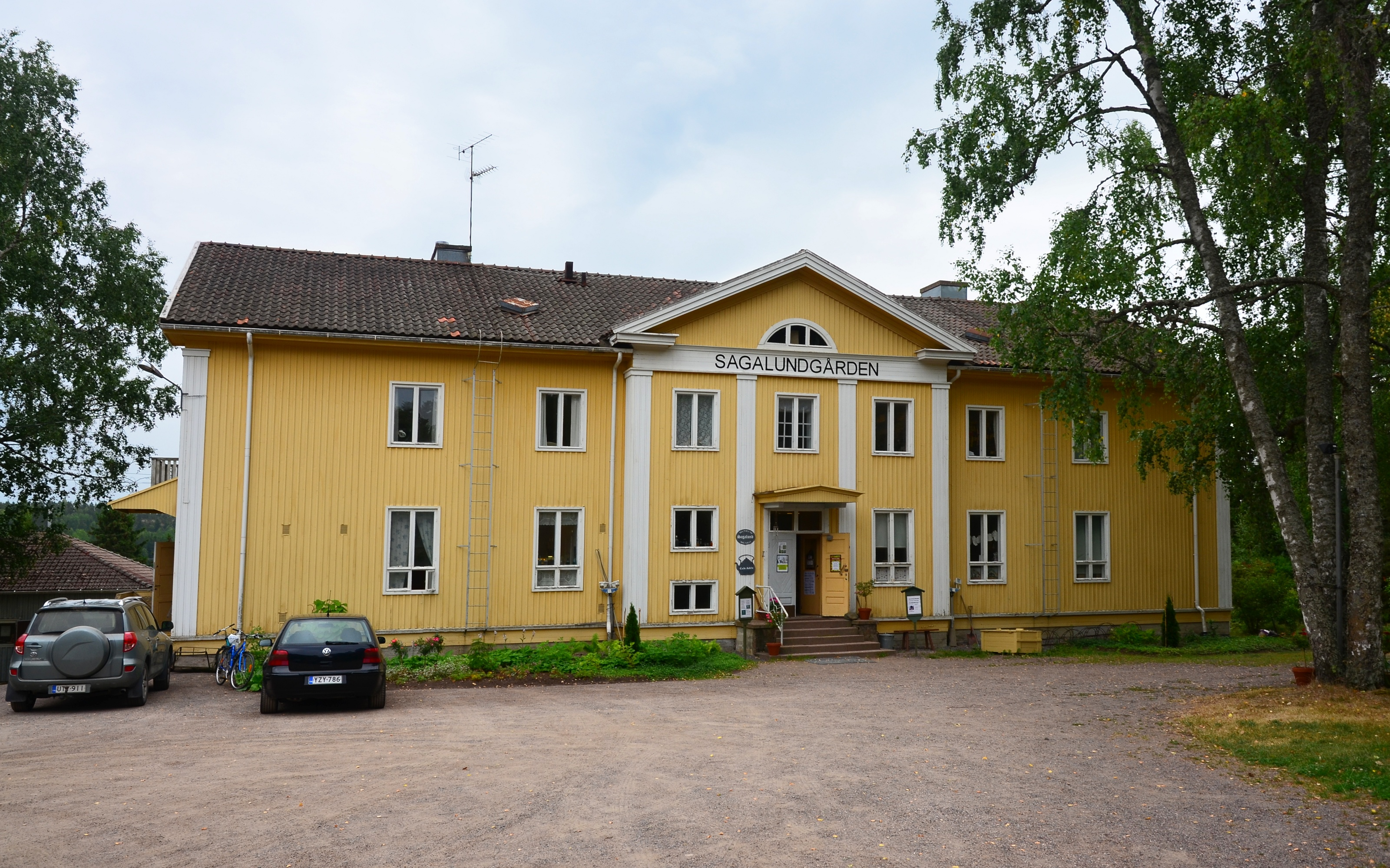 Sagalundgården i Kimito, Finland.